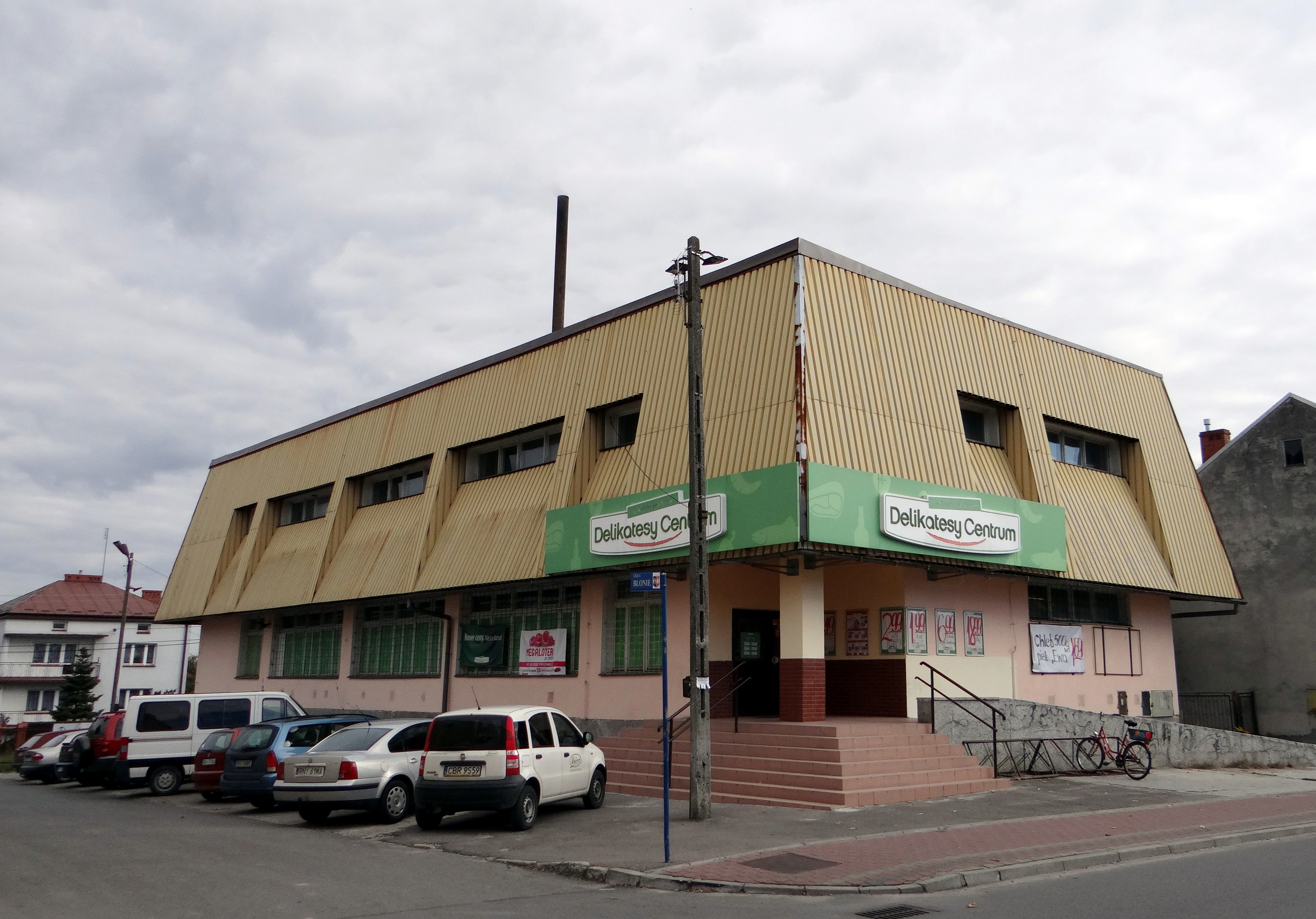 Rudnik nad Sanem - Delikatesy Centrum